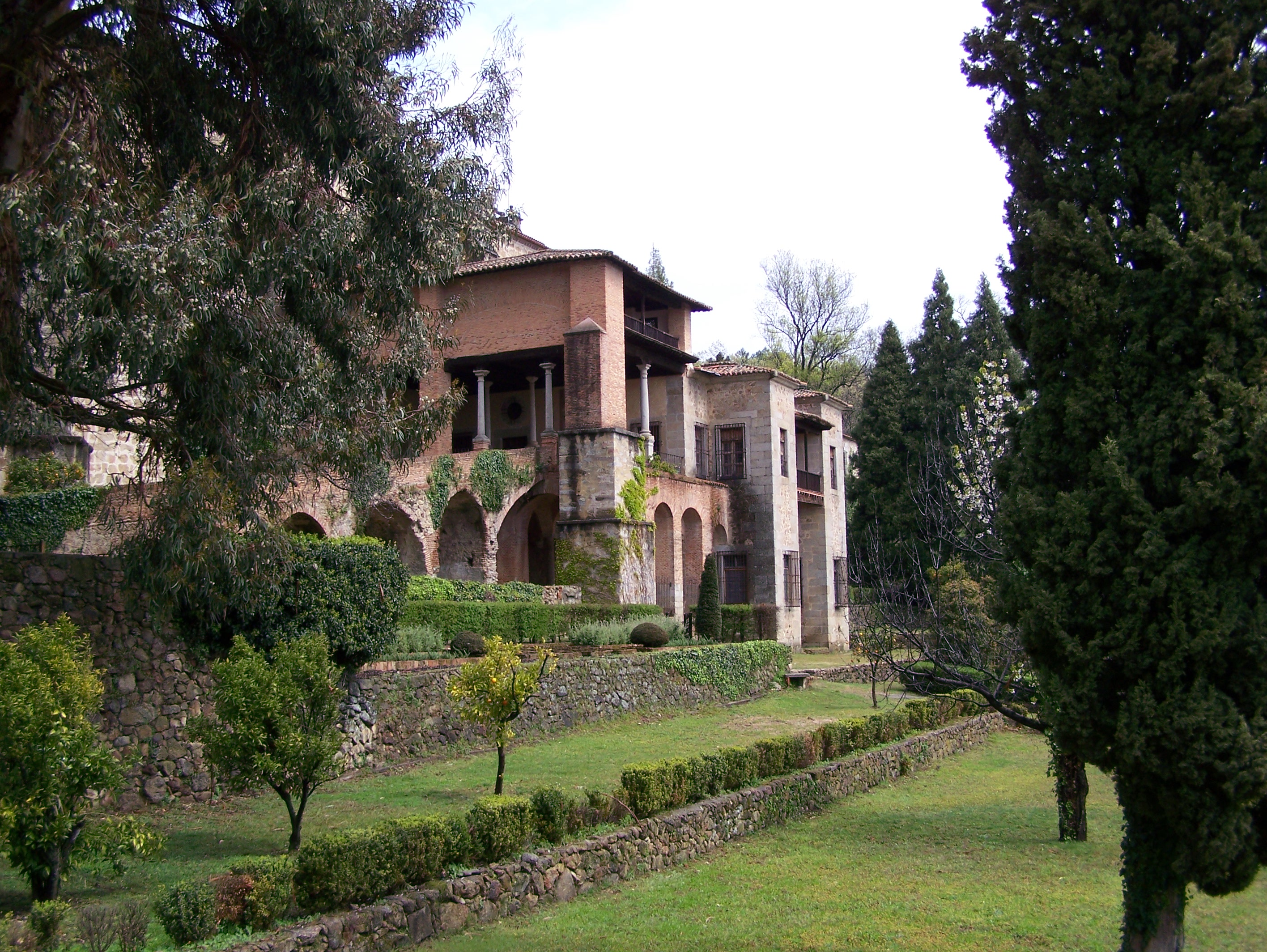 Fotografía del monasterio de Yuste, Cáceres, España100_3800